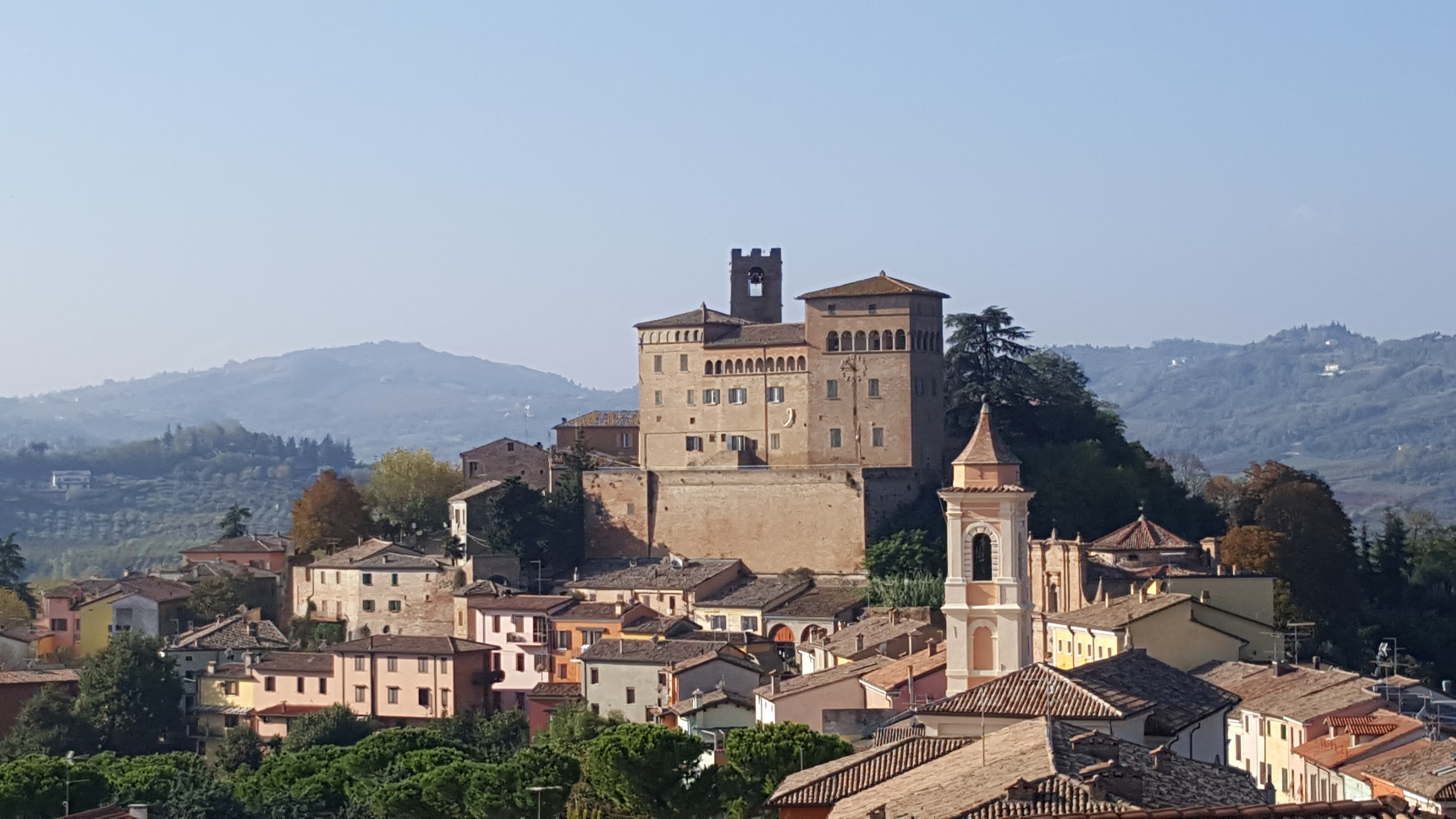 Il Castello This is a photo of a monument which is part of cultural heritage of Italy.